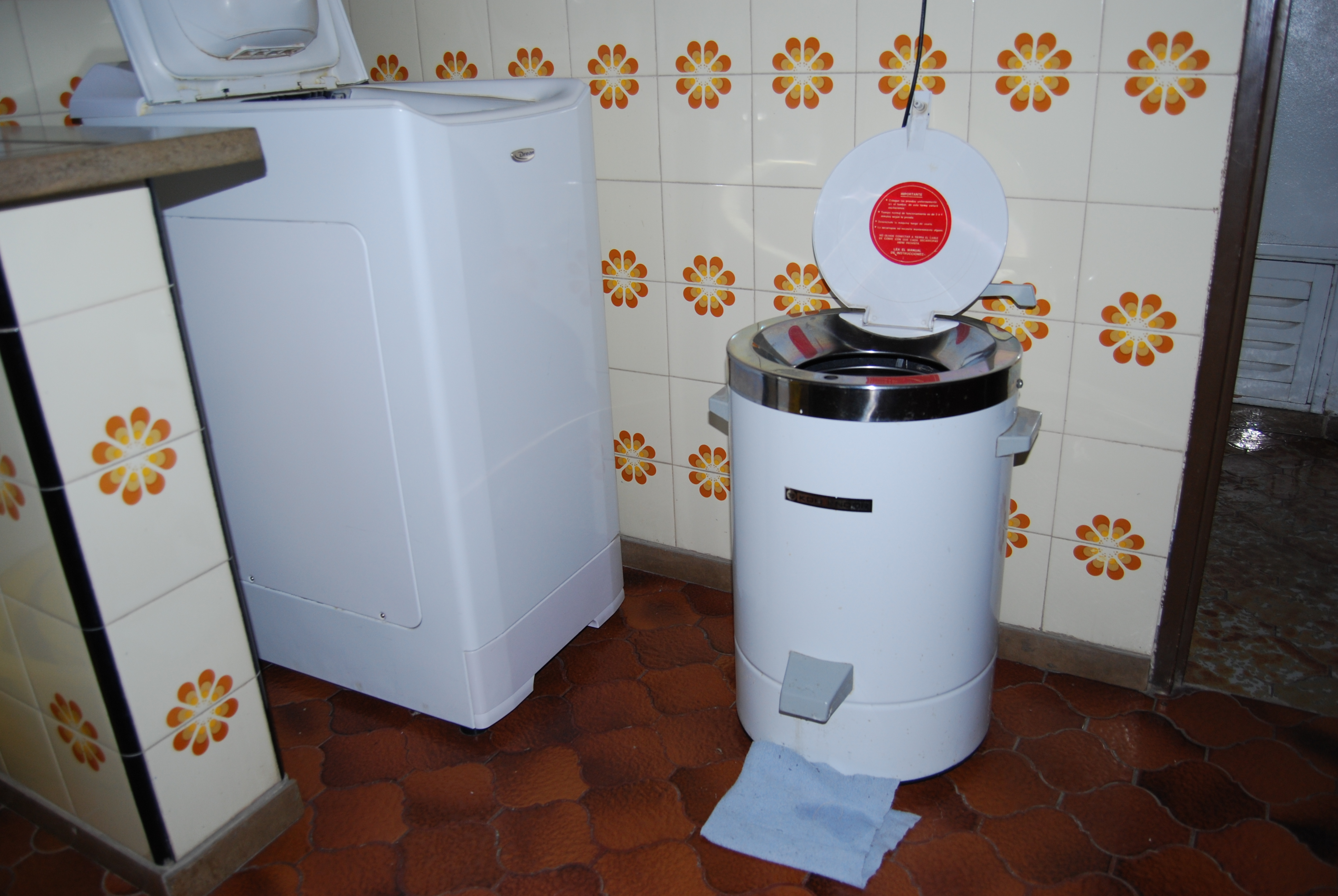 Secador de ropa centrifugo, eléctrico.